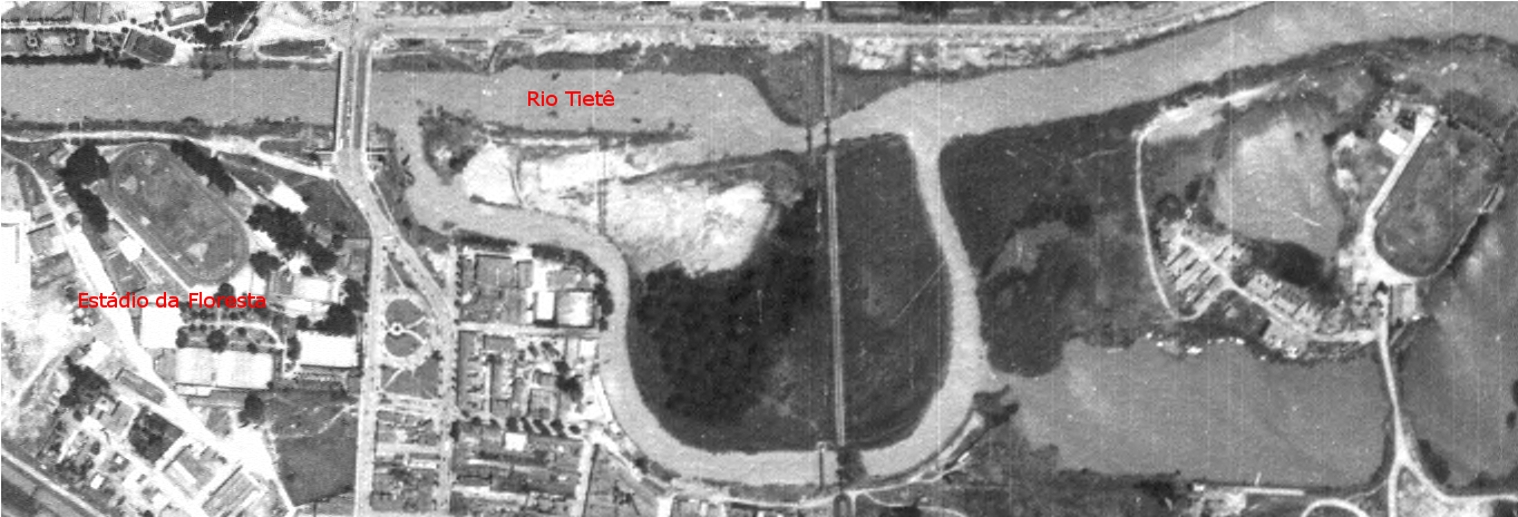 Imagem aérea do Estádio da Floresta (antigo estádio do São Paulo da Floresta), Ponte das Bandeiras e Rio Tietê no início da Década de 40. Feitas para um dos primeiros mapeamentos da cidade. À direita, vê-se também o Ilha da Madeira (antigo estádio da Portuguesa de Desportos)